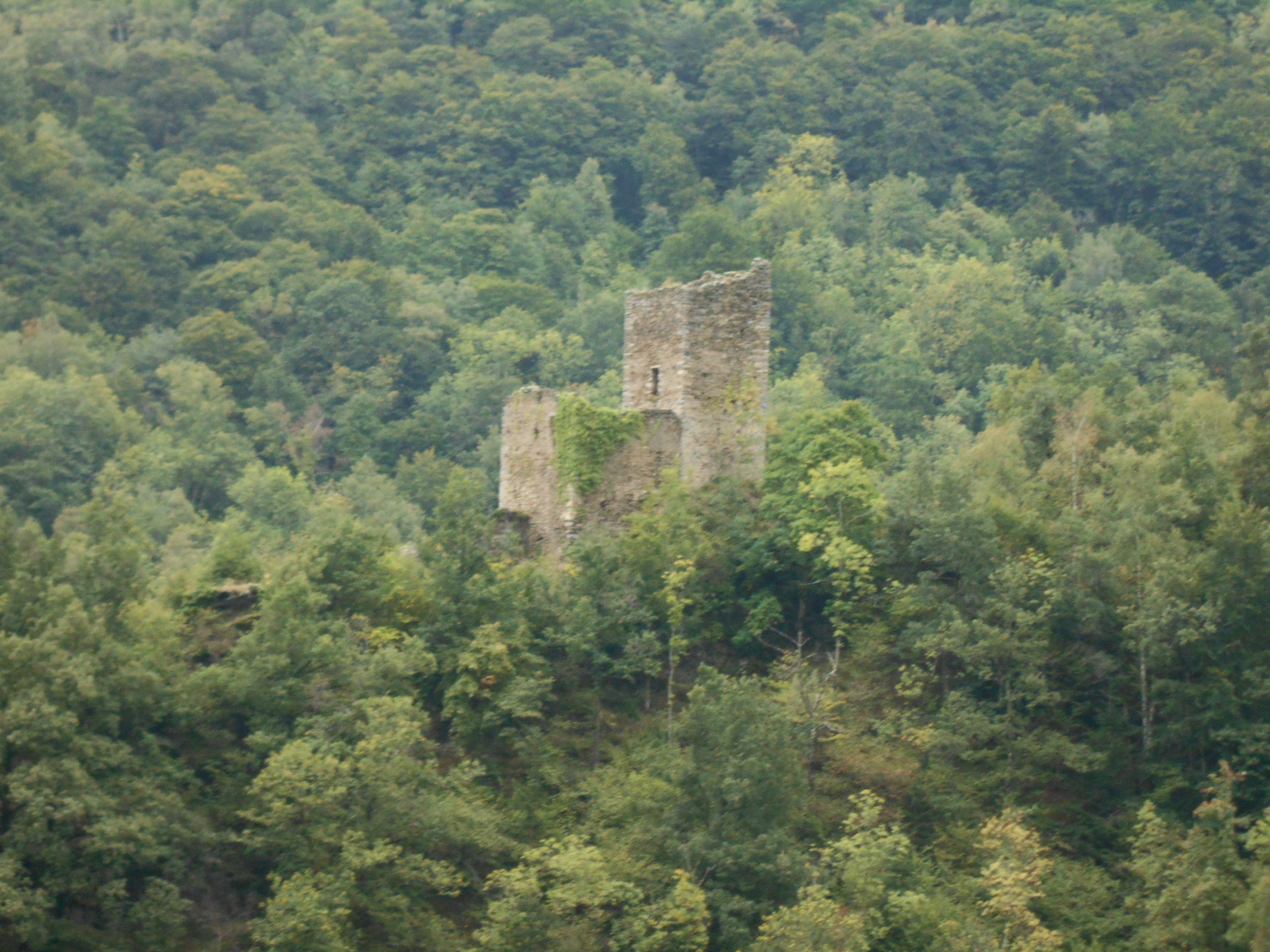 El Castell del Burc, o de Vallmanya